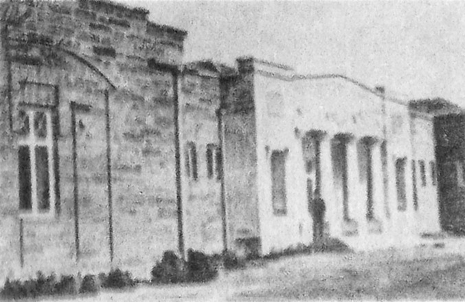 грязелечебница "Мойнаки". Конец XIX в.